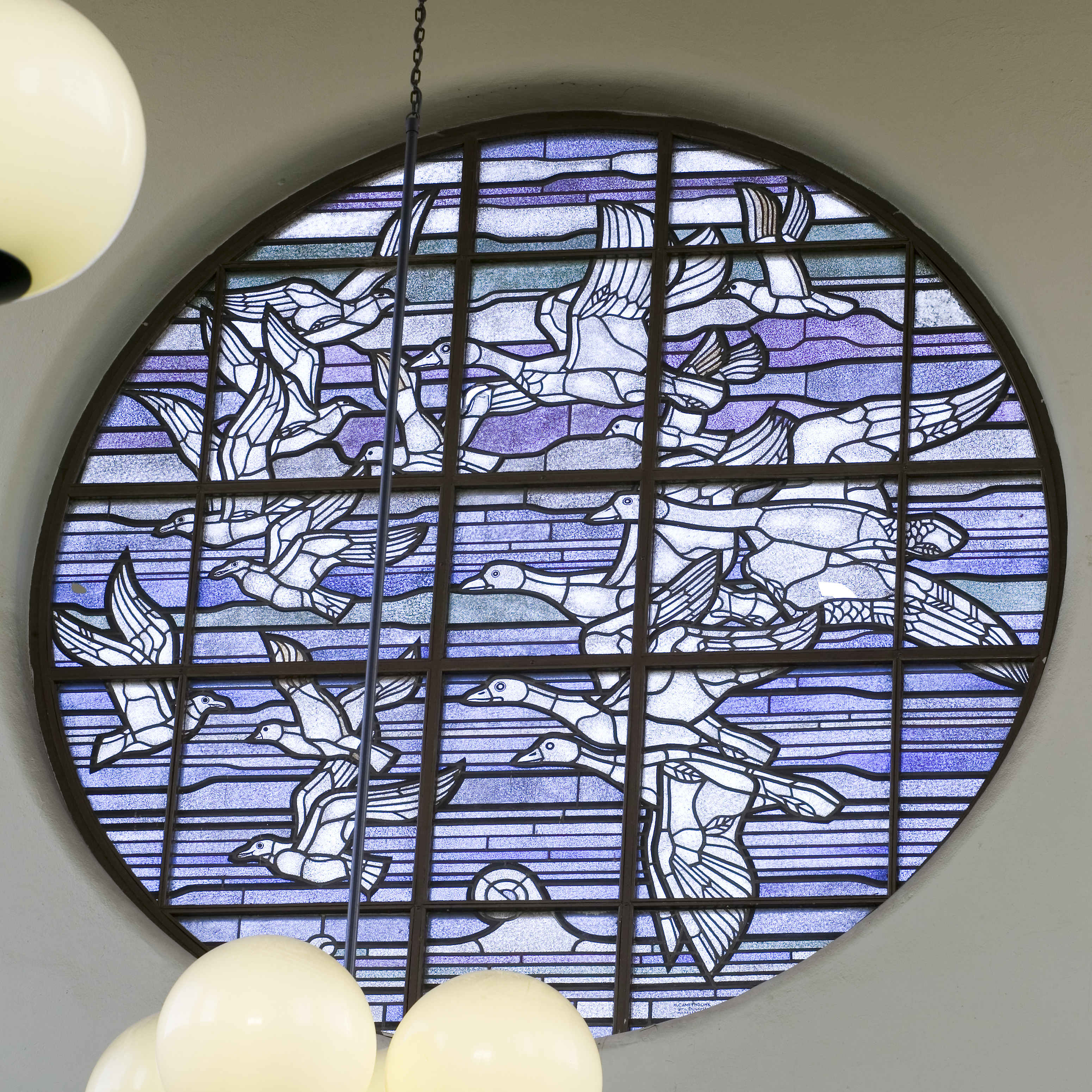 Voormalig station Amsterdam-Muiderpoort: Interieur, overzicht van het ronde glas-in-loodraam in de noordwand van de stationshal met de voorstelling van "De Vogeltrek", naar ontwerp van prof. Heinrich van Campendonk